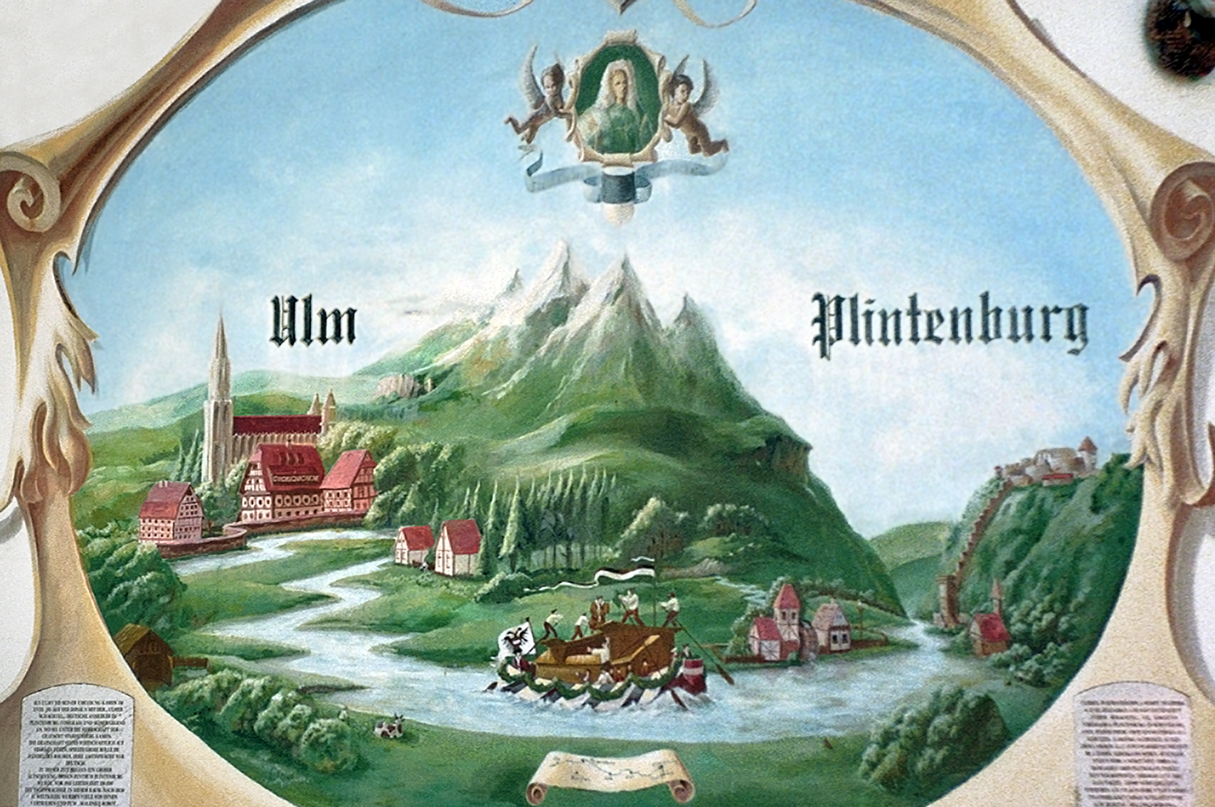 Ulm - Plintenburg. Fresko in Visegrád/Ungarn zur Erinnerung an die Neubesiedlung des Ortes durch die „Donauschwaben“ nach den Türkenkriegen und deren Vertreibung 1946.